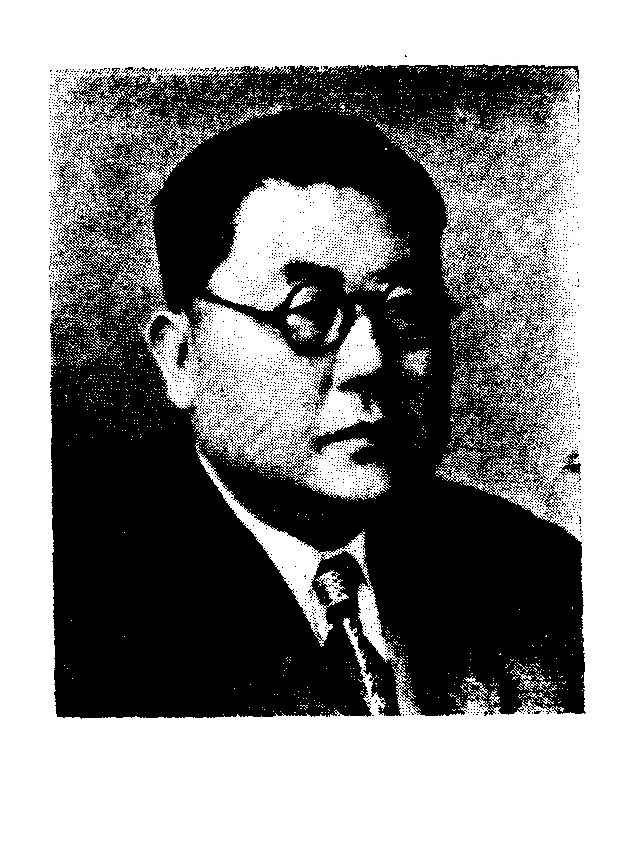 中文（中国大陆）: 第一屆立法委員